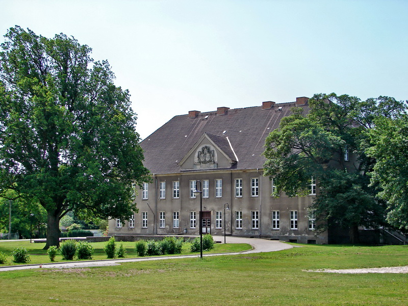 Gutshaus Cölpin - Front